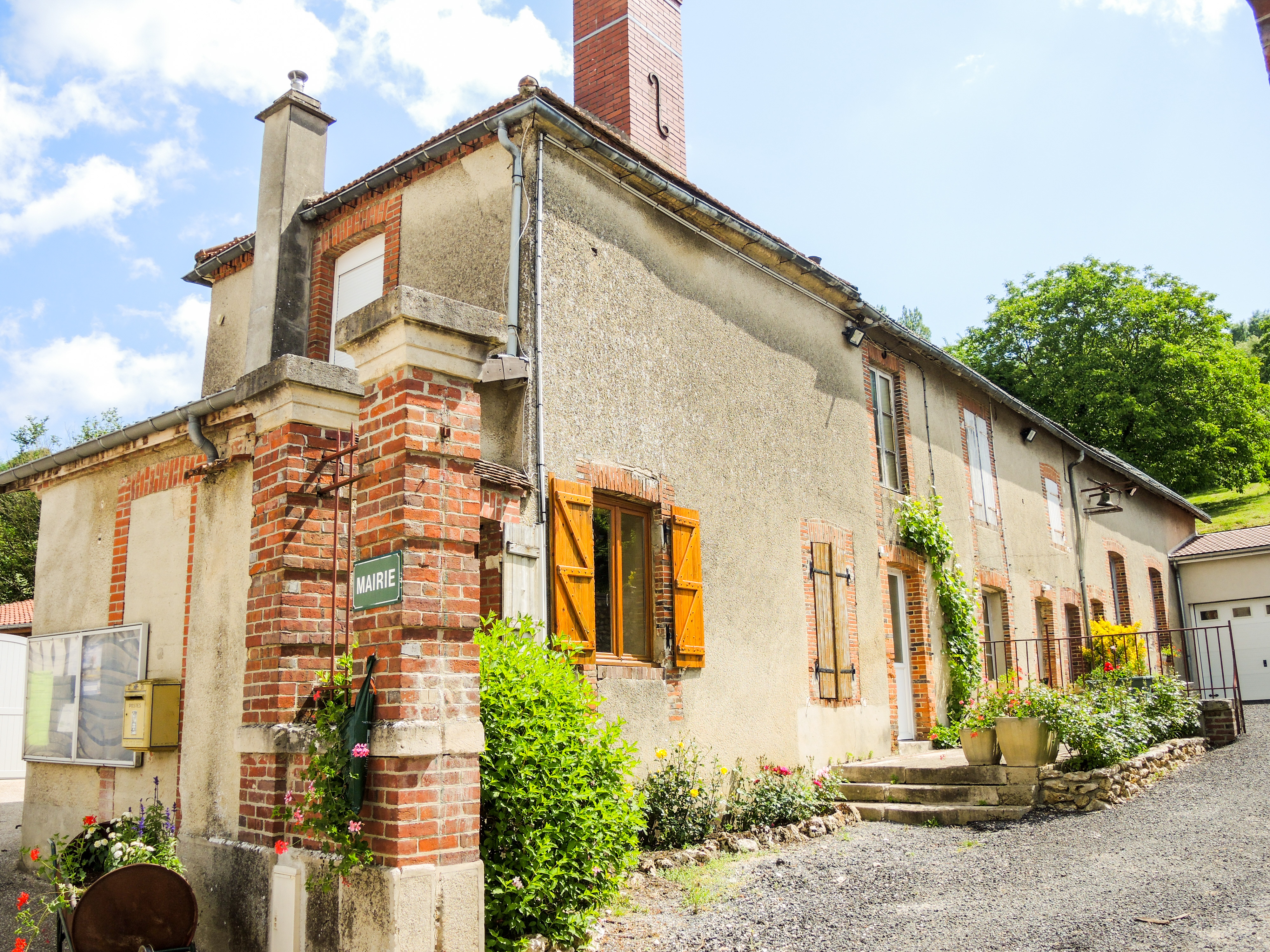 Façade de la mairie de Cormoyeux. Marne